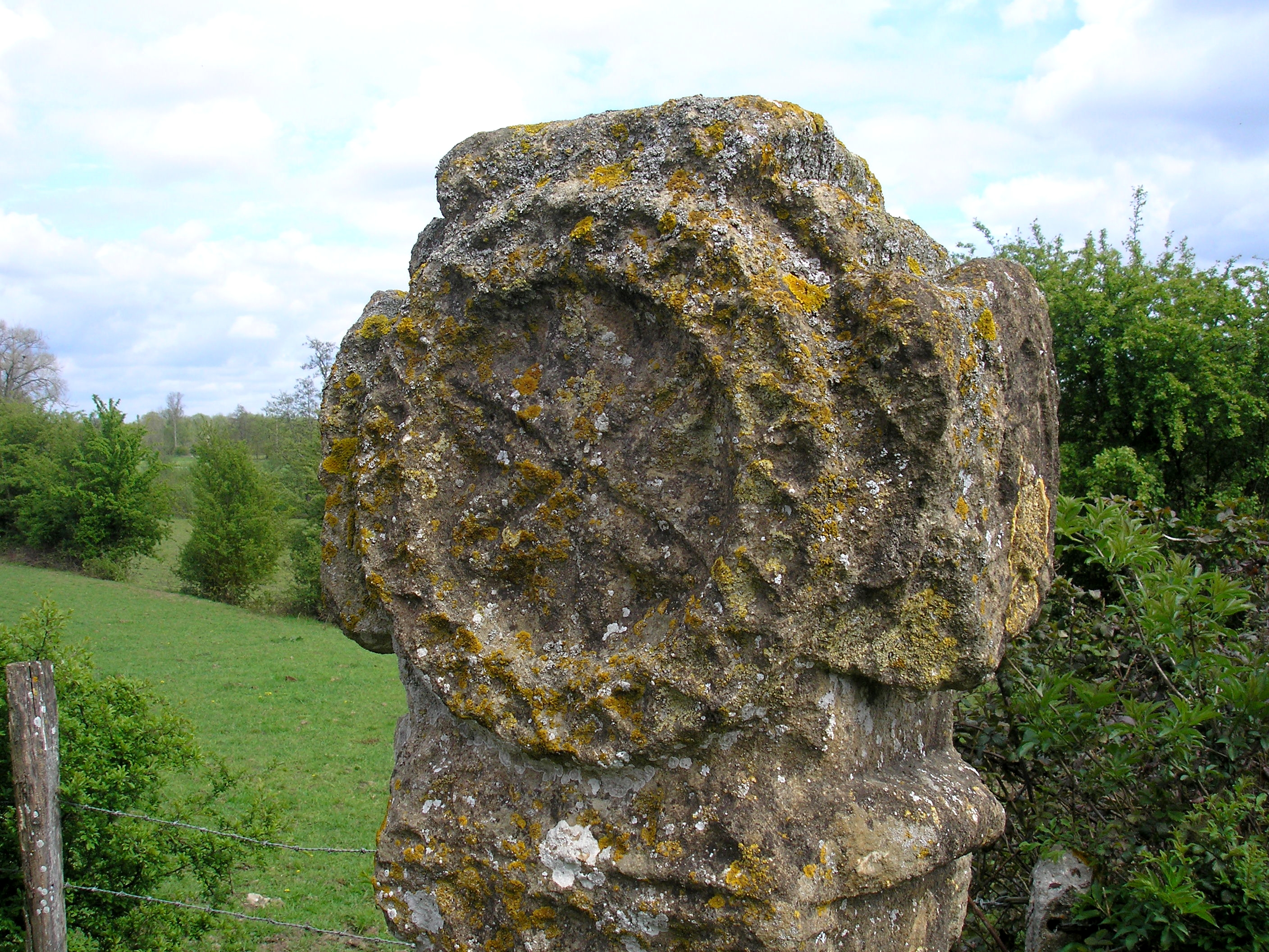 Vendeuvre (Normandie, France). Tête de la croix romane de Grisy.